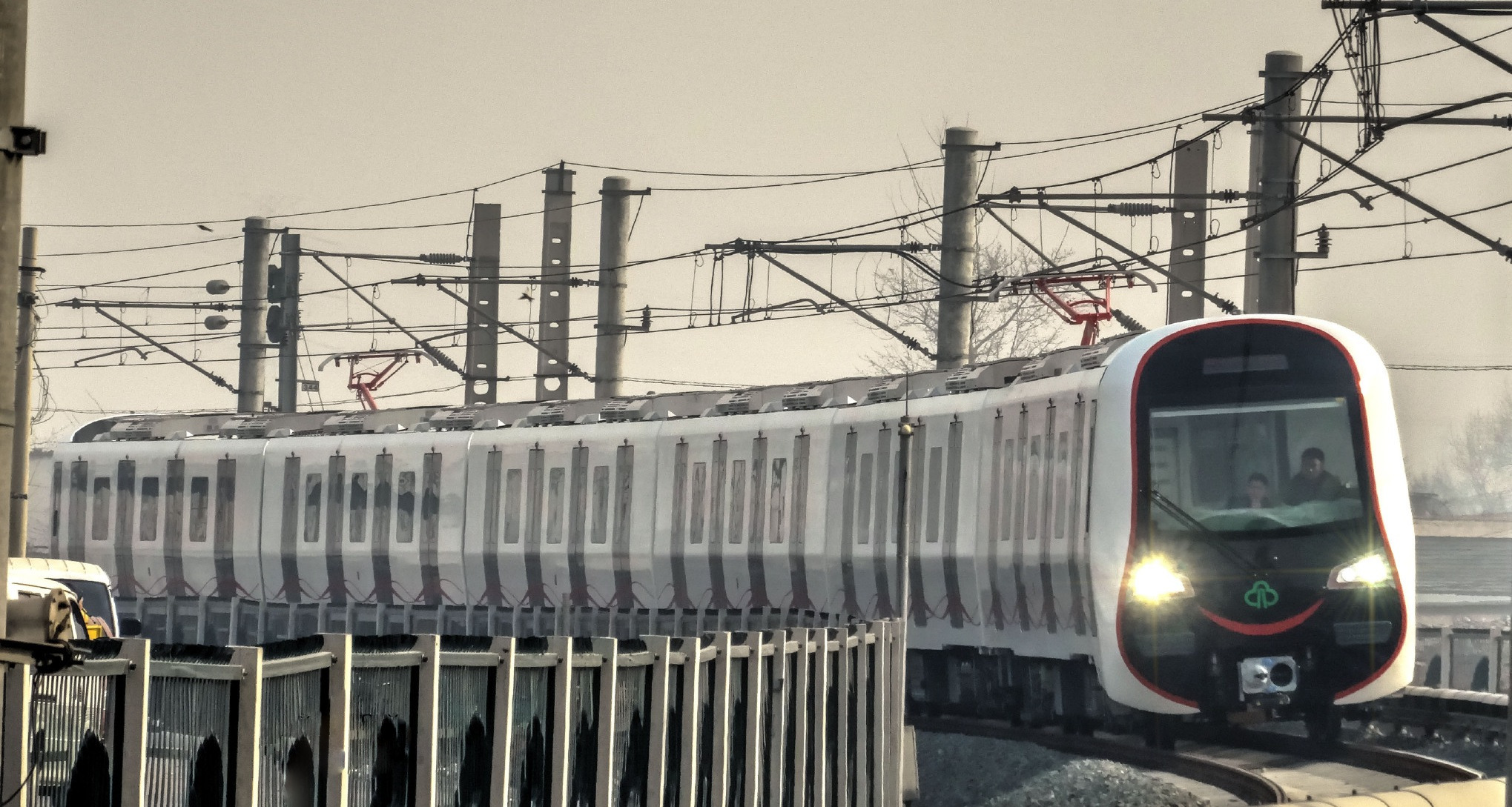 福州地铁1号线B2型列车试车